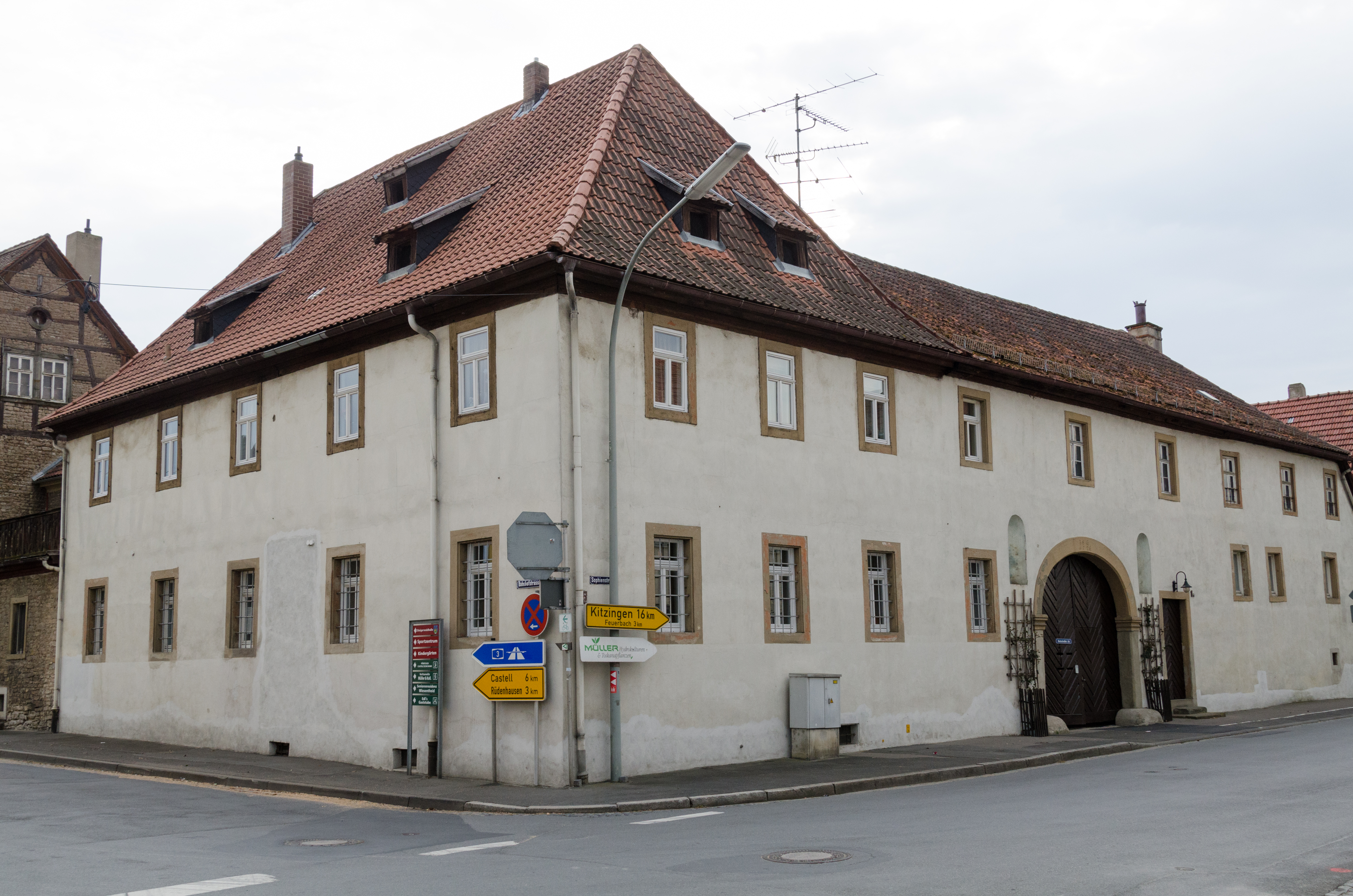 Wiesentheid, Bahnhofstraße 2a